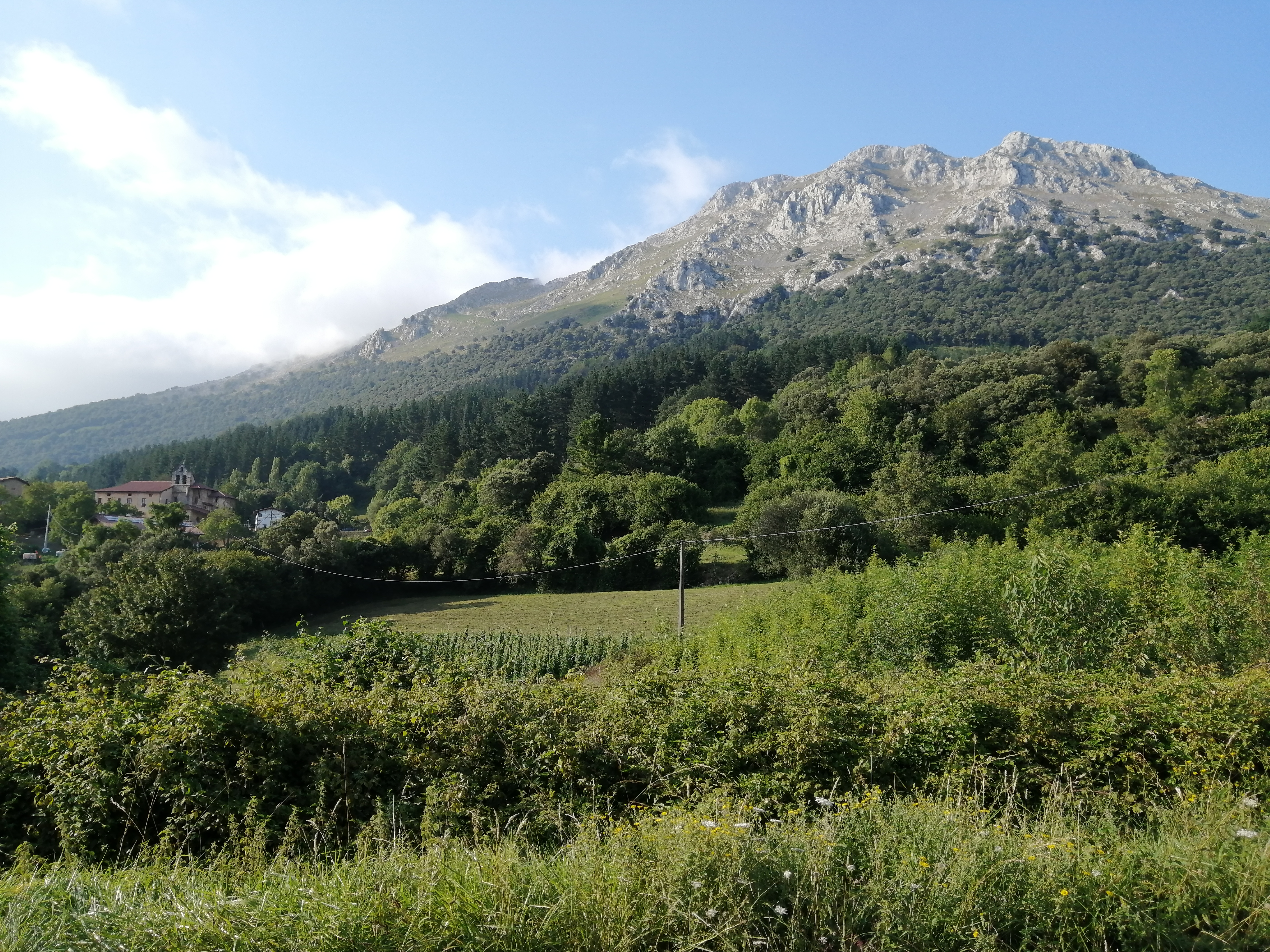 Udala auzoa eta Udalatx mendia, Arrasaten